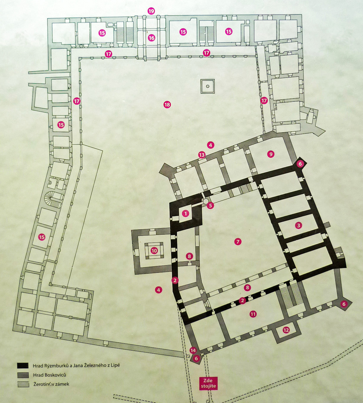 Grundriss vom Schloss in Mährisch Trübau (Moravská Třebová)